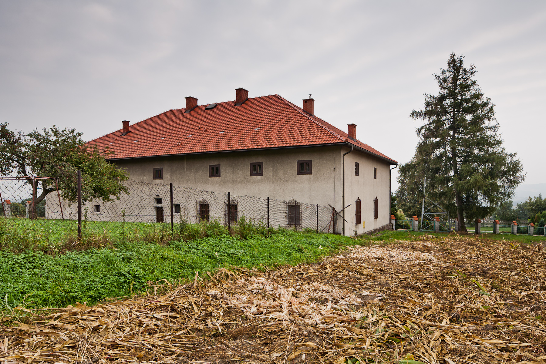 Zespół dworsko-folwarczny Karmelitów Bosych z Czernej, Siedlec - jeden z budynków